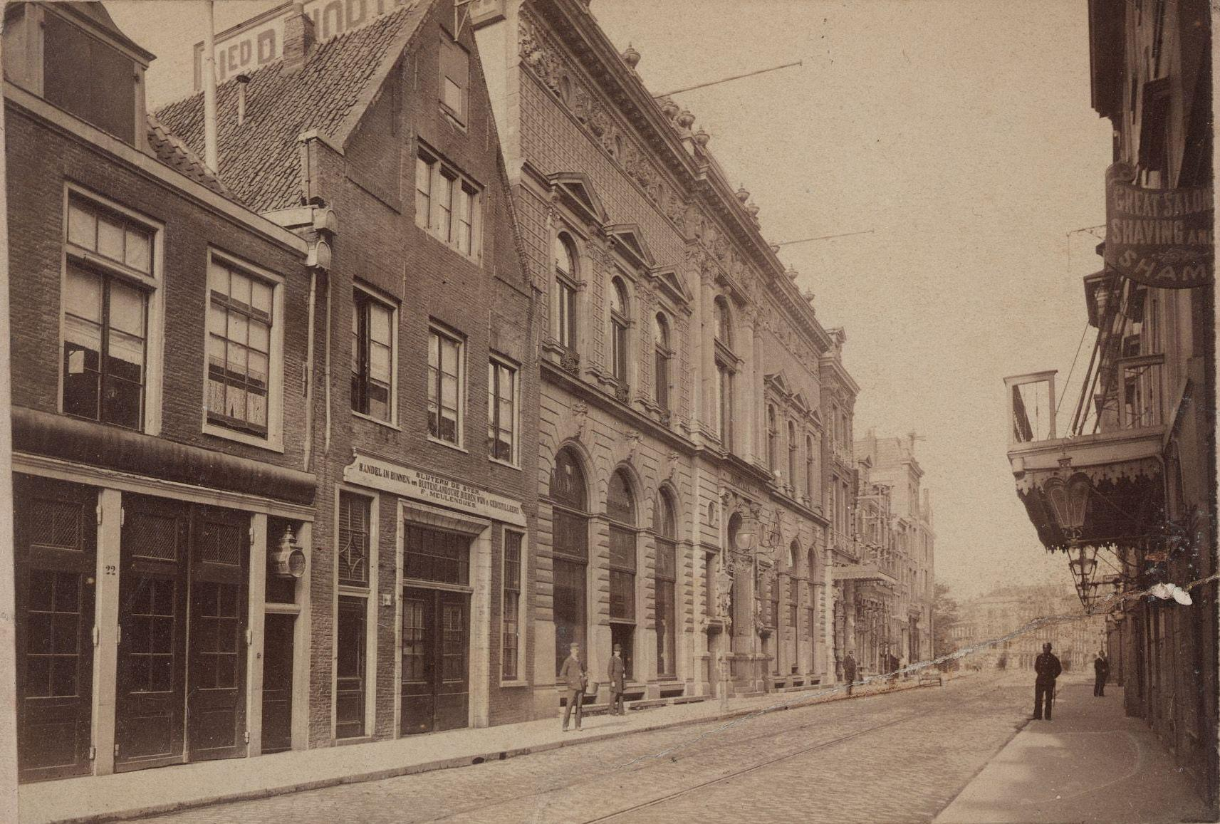 Foto door A.T. Rooswinkel (geboren in 1838, die is vast wel meer dan 70 jaar dood reeds)